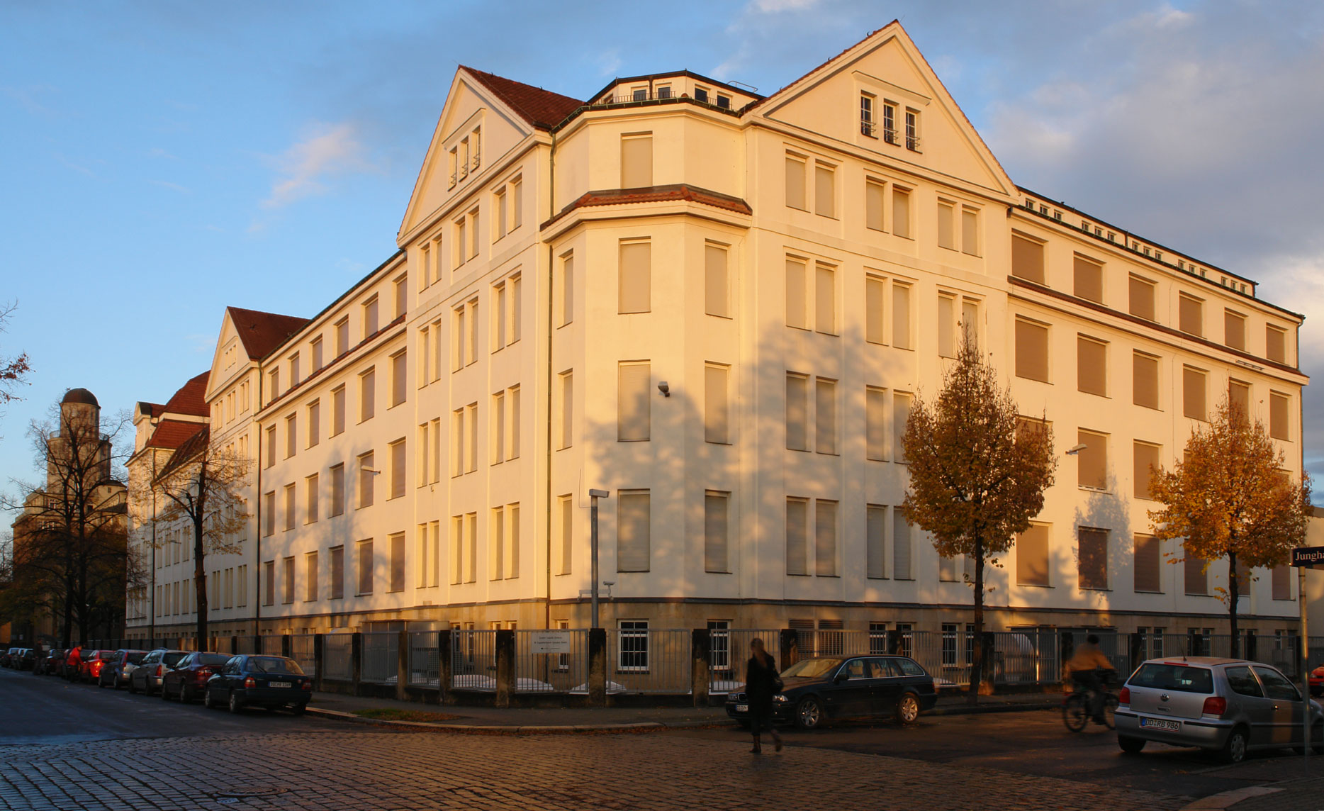 Ehemalige United AG Zigarettenmaschinenfabrik Wilhelm Lande